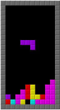 Jogo desenvolvido por Aldair Tetrovisk